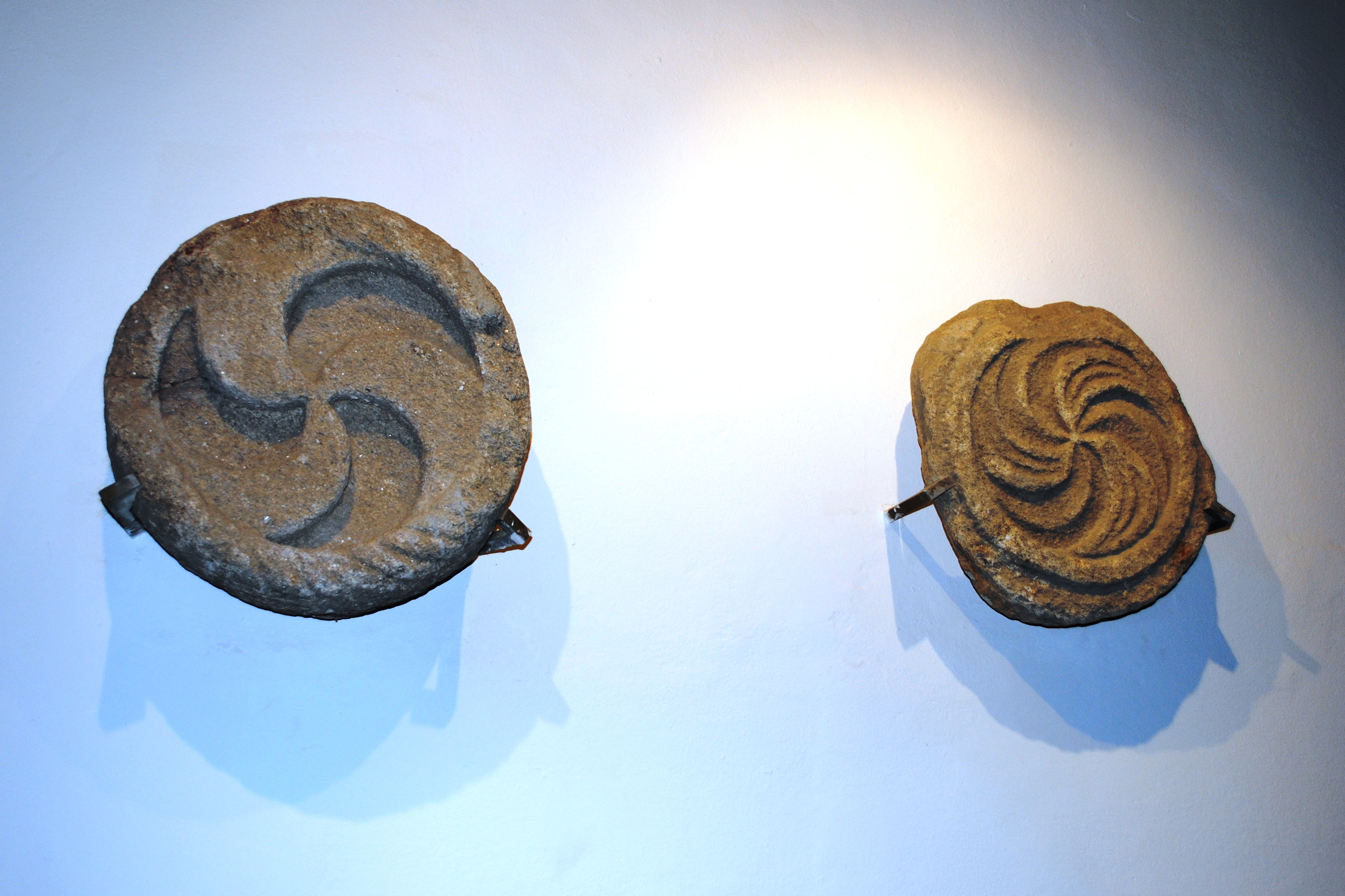 Museo arqueolóxico Monte Santa Trega